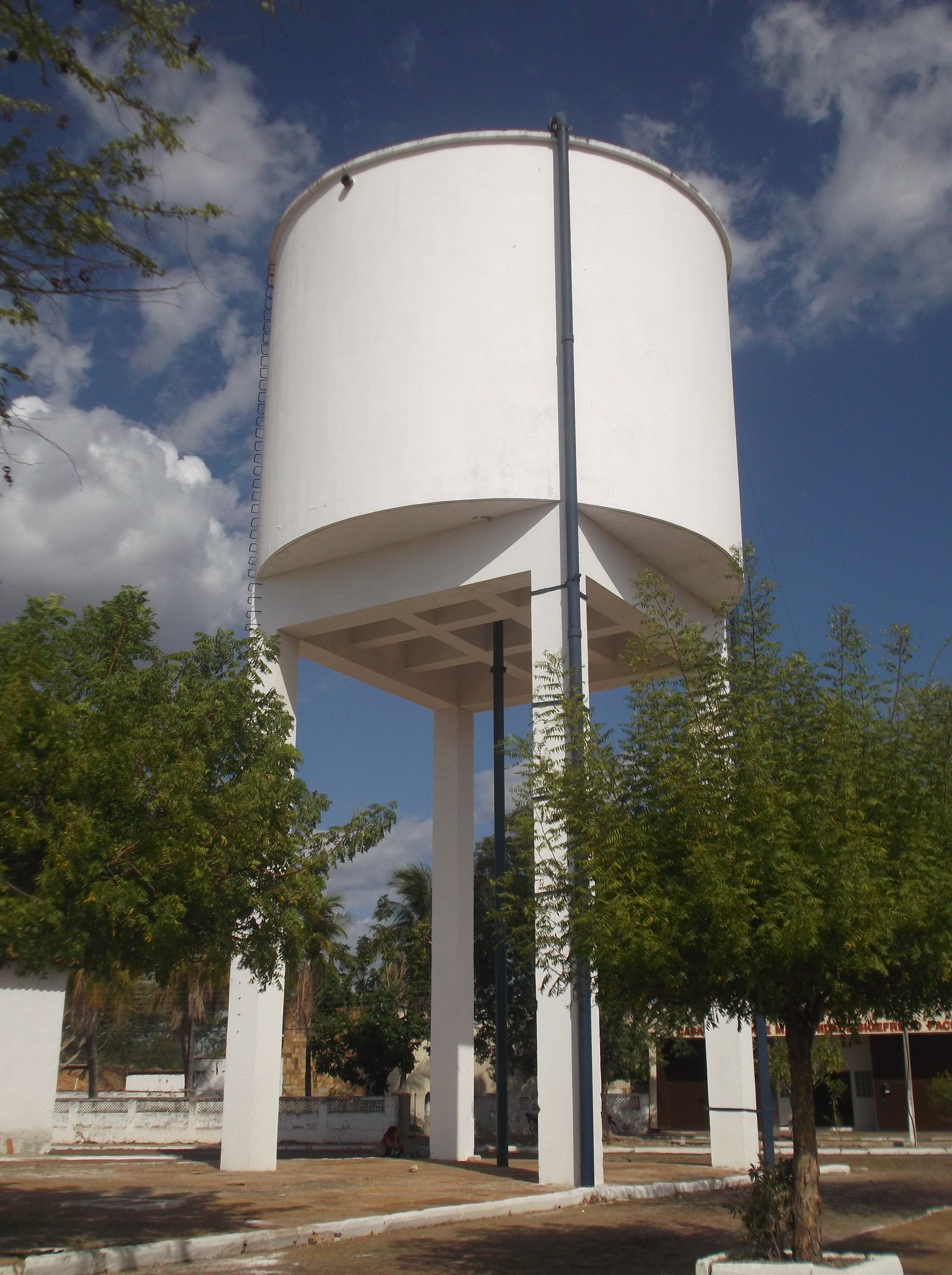 Caixa d'água construida pelo DNOCS em Campo Maior no ano de 1960.